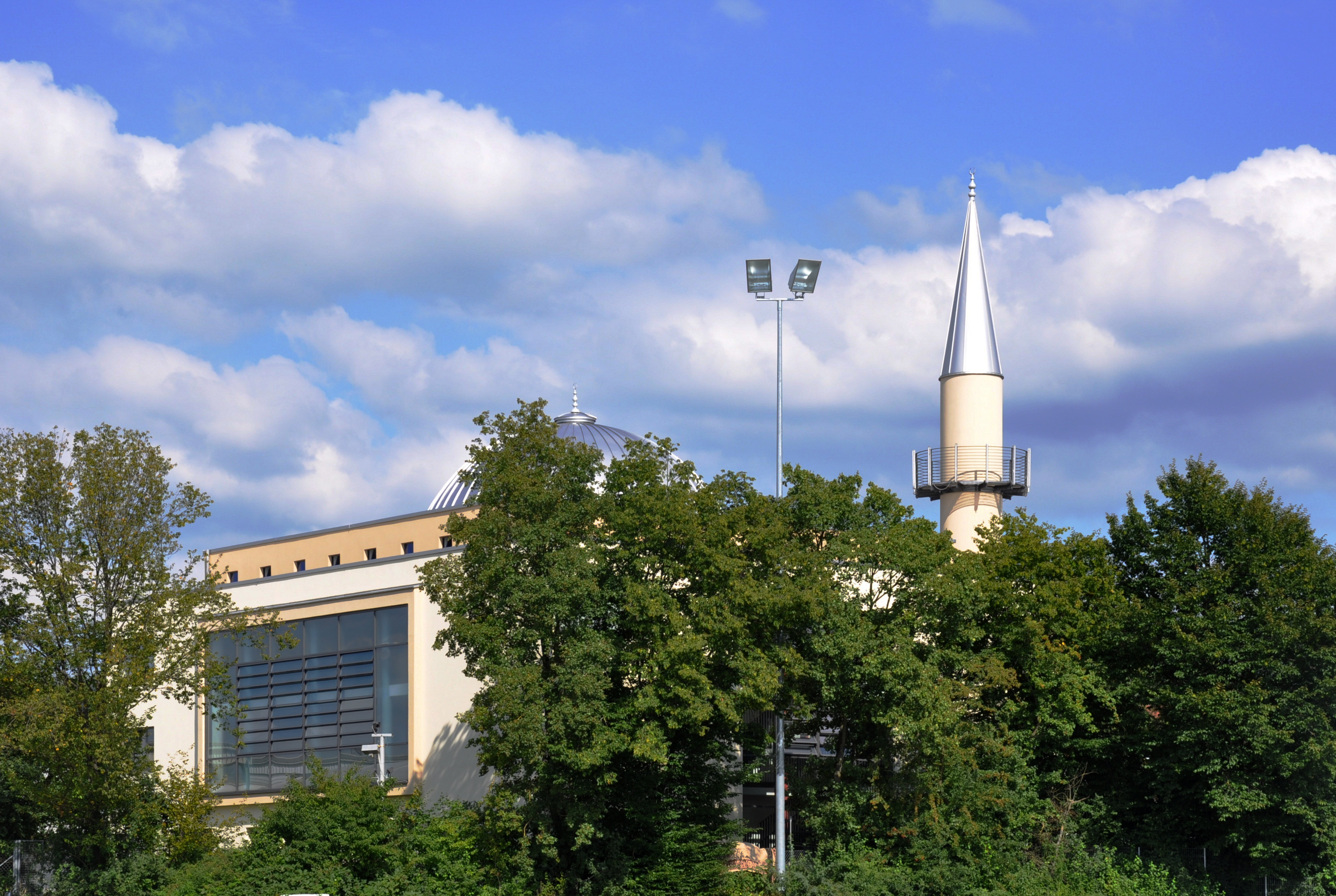 Ravensburg, Mevlana-Moschee, gesehen vom Parkplatz der Oberschwabenhalle